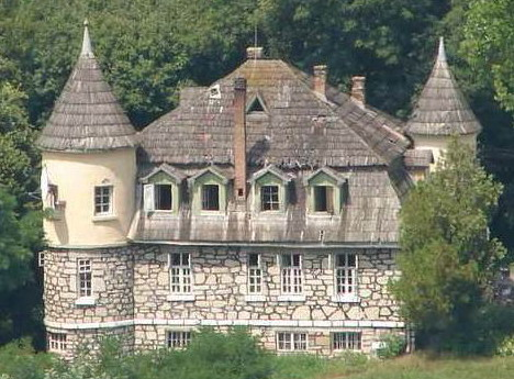 Cabana de la Cheile Turzii